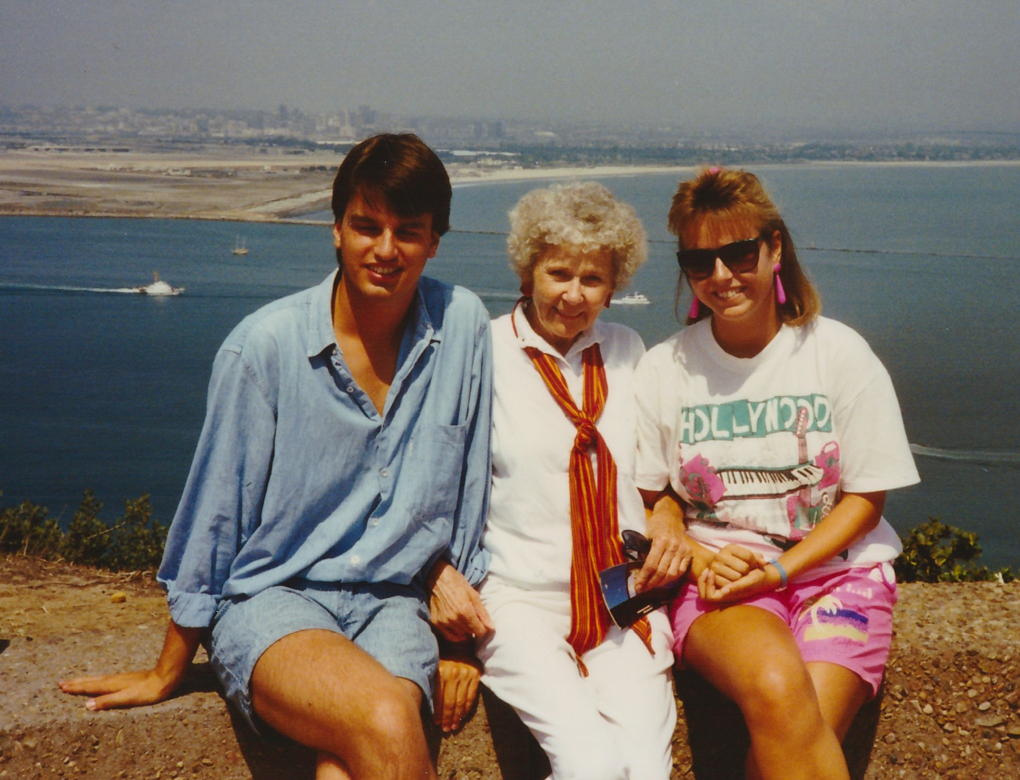 la usona esperantisto Ellie Stein (meze) en la 1990-aj jaroj kun la eŭropaj esperantistoj Thomas Pusch kaj Birgit Prien